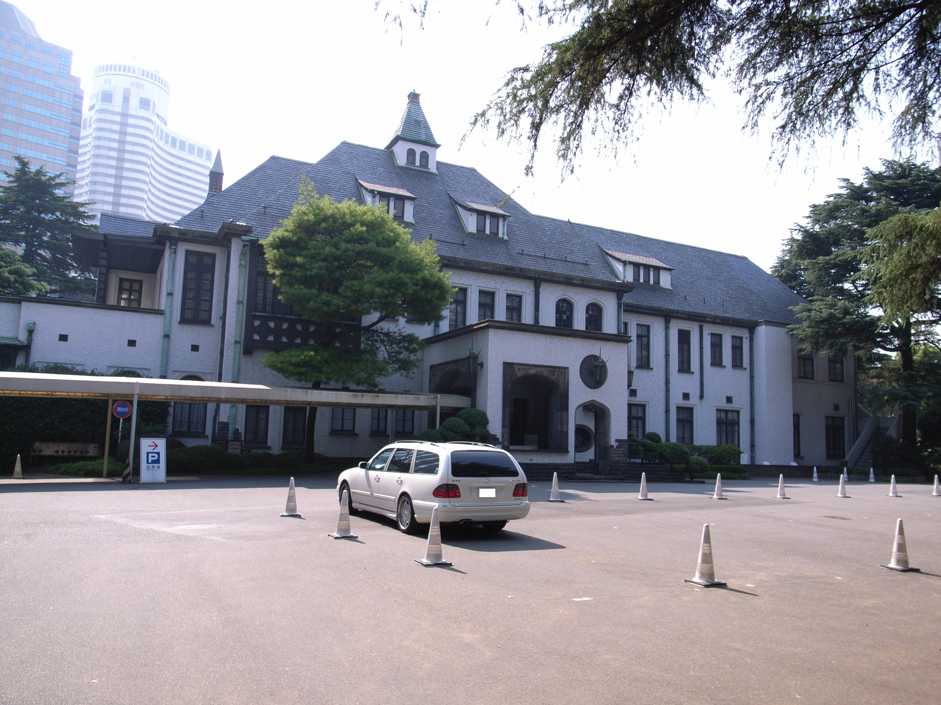 東京都千代田区紀尾井町・赤坂プリンスホテル旧館